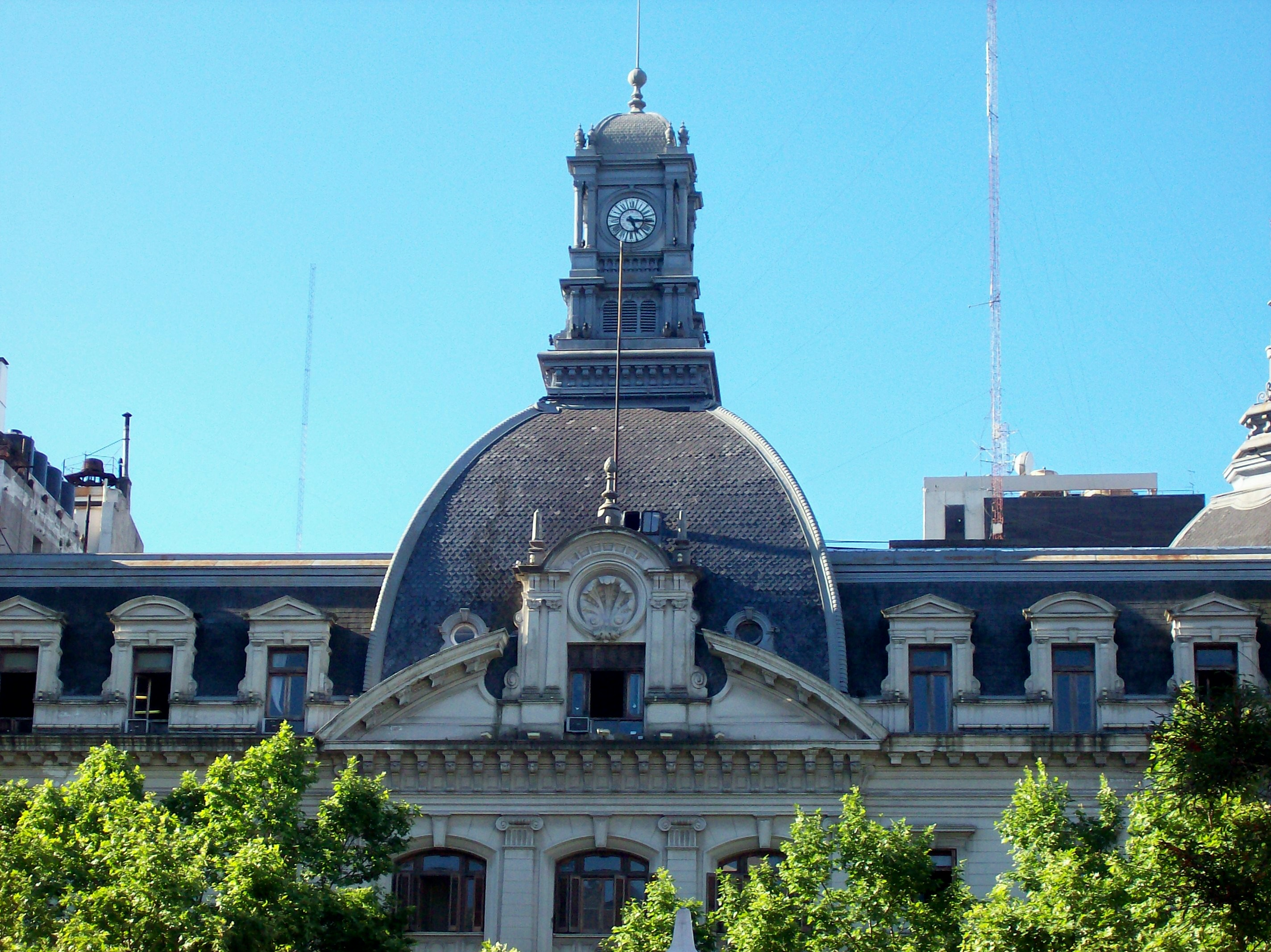 Cúpula del Palacio Municipal de la Ciudad de Buenos Aires , Barrio de Monserrat.